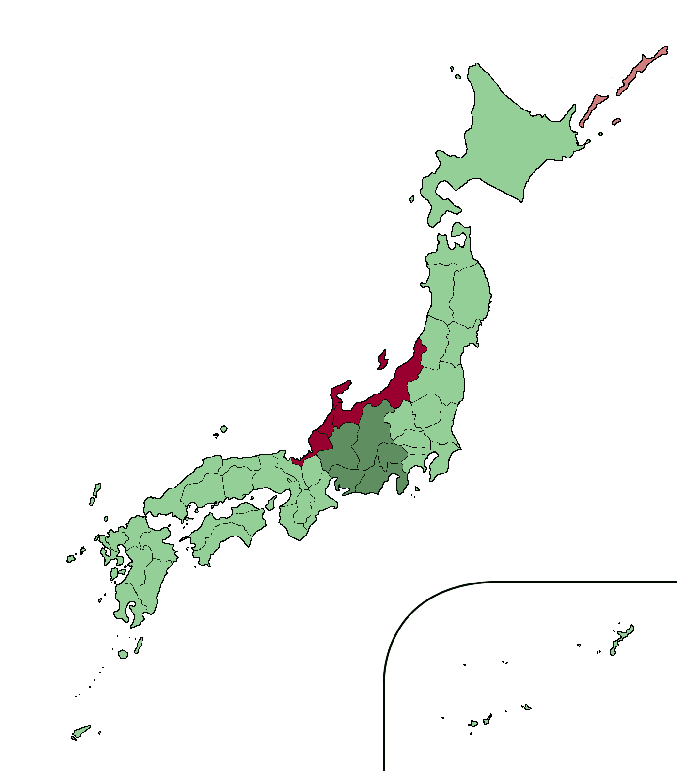 Map of Hokuriku region in Chubu Japan